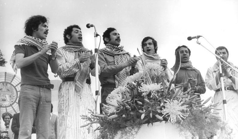 ADN-ZB Ludwig-8.6.74 Erfurt: 15. Arbeiterfestspiele - Studenten aus Palästina, die zur Zeit in der DDR studieren, wirkten am 8.6.74 in einem Programm der Leipziger Karl-Marx-Universität unter dem Titel "Unser Lied auf dem Frieden beruht" mit. Die Studenten zeigten ihr Arbeiterfestspiel-Programm auf der Freilichtbühne de iga-Geländes.